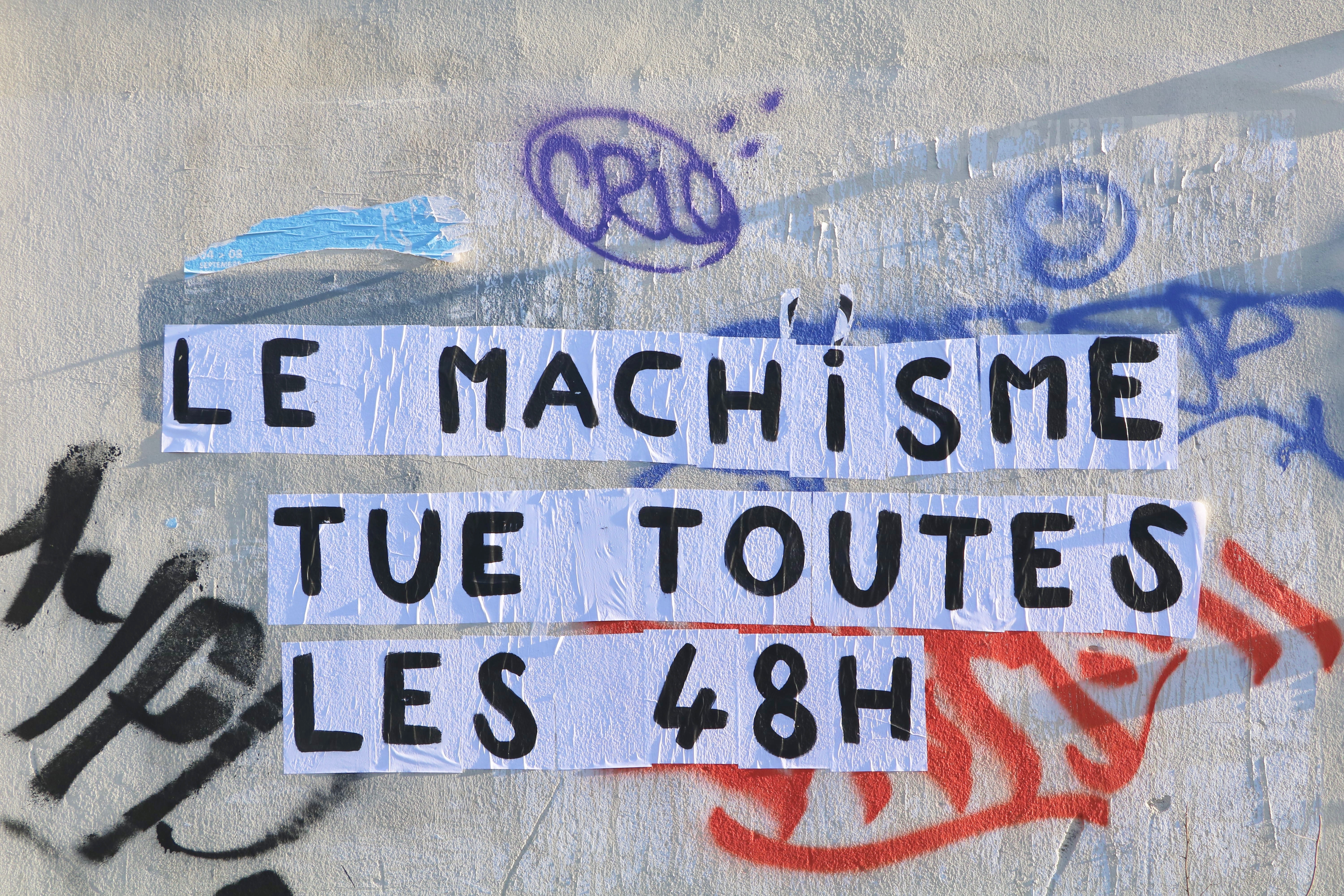 Protestation contre les violences faites aux femmes